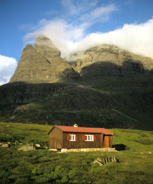 NTKs hytte i Giklingdalen med Innerdalstårnet bak. Foto: Tore Røraas / Marianne Gjørv.